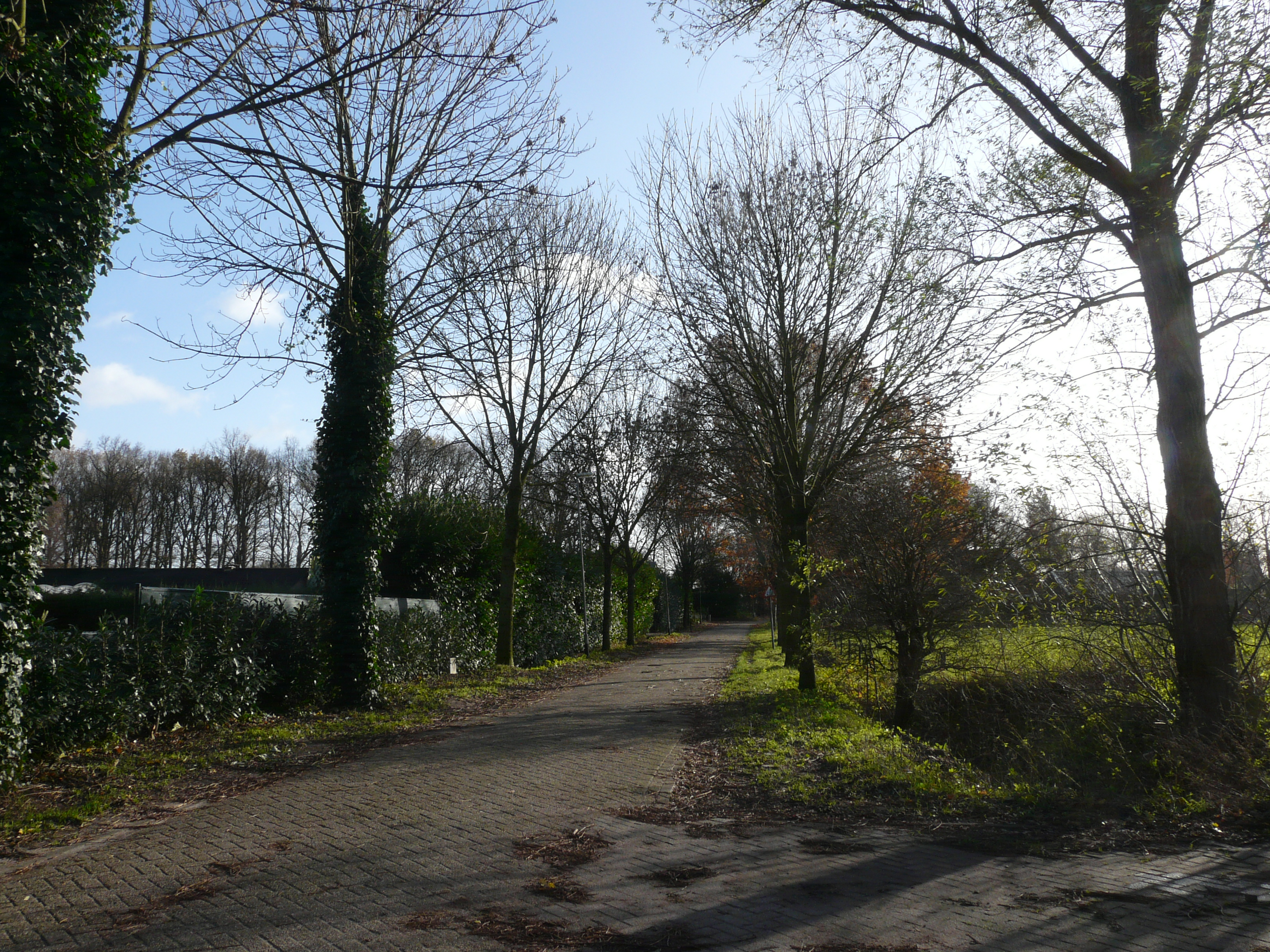 Zicht op een deel van de straat de Rietdijk. Gelegen nabij de wijk de Asterd in het grote stadsdeel de Haagse Beemden in het noorden van Breda